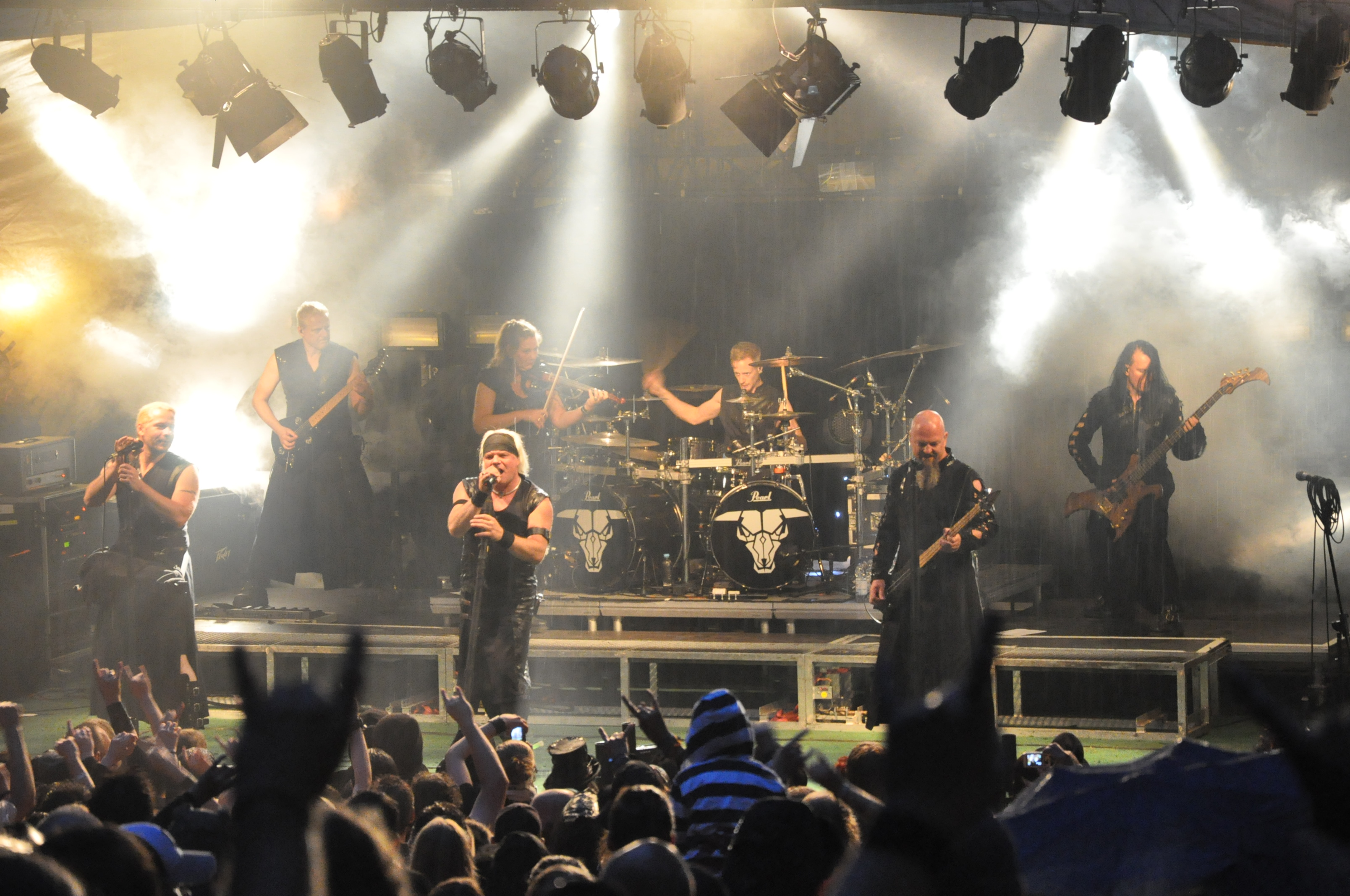 Feuertal 2013 in Wuppertal auf der Waldbühne Hardt: Gruppe Subway to Sally